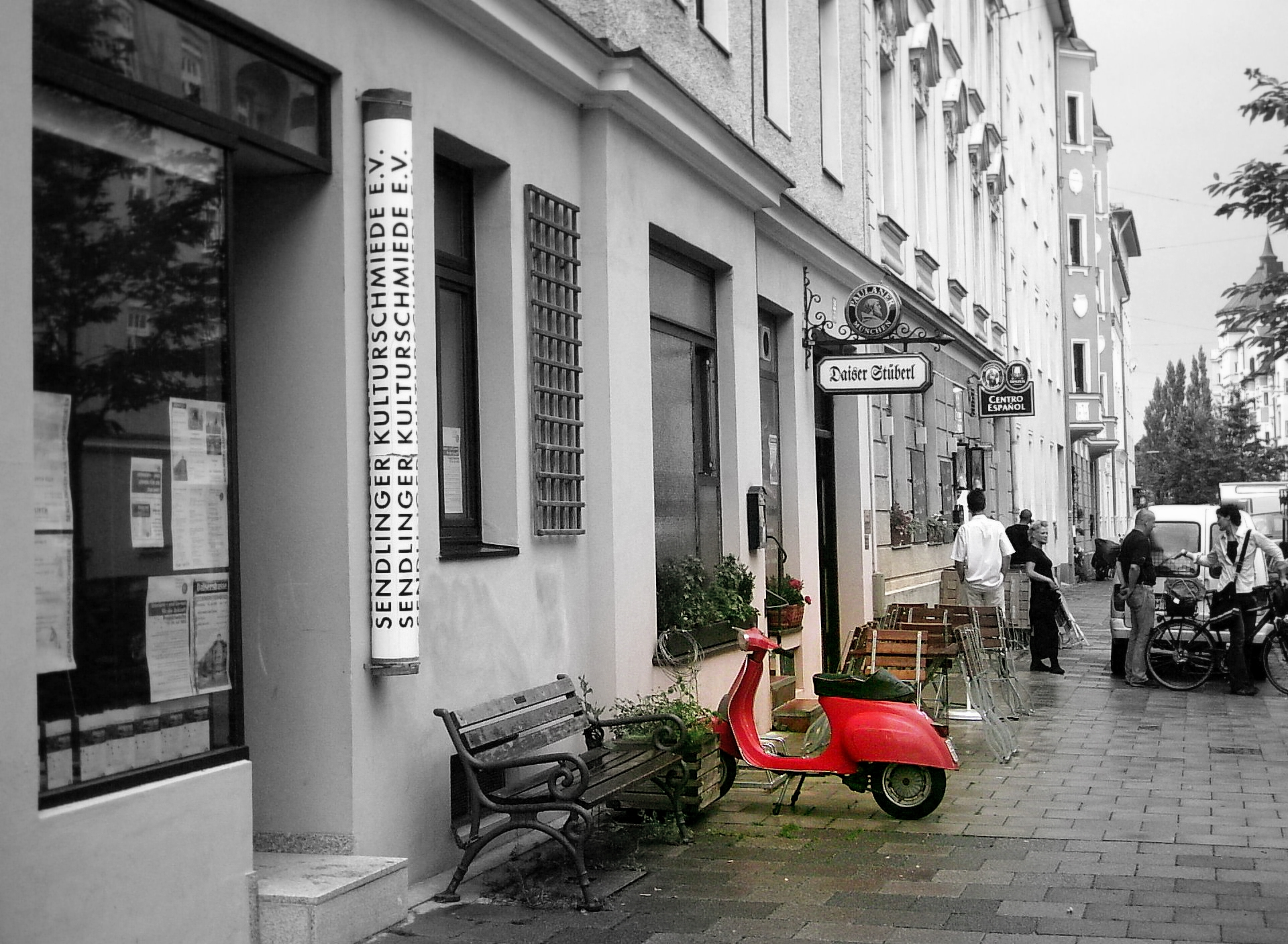 Sendlinger Kulturschmiede in Daiserstraße, Munich-Sendling. Image made and uploaded by Dominik Hundhammer, München, 28. February 2006.